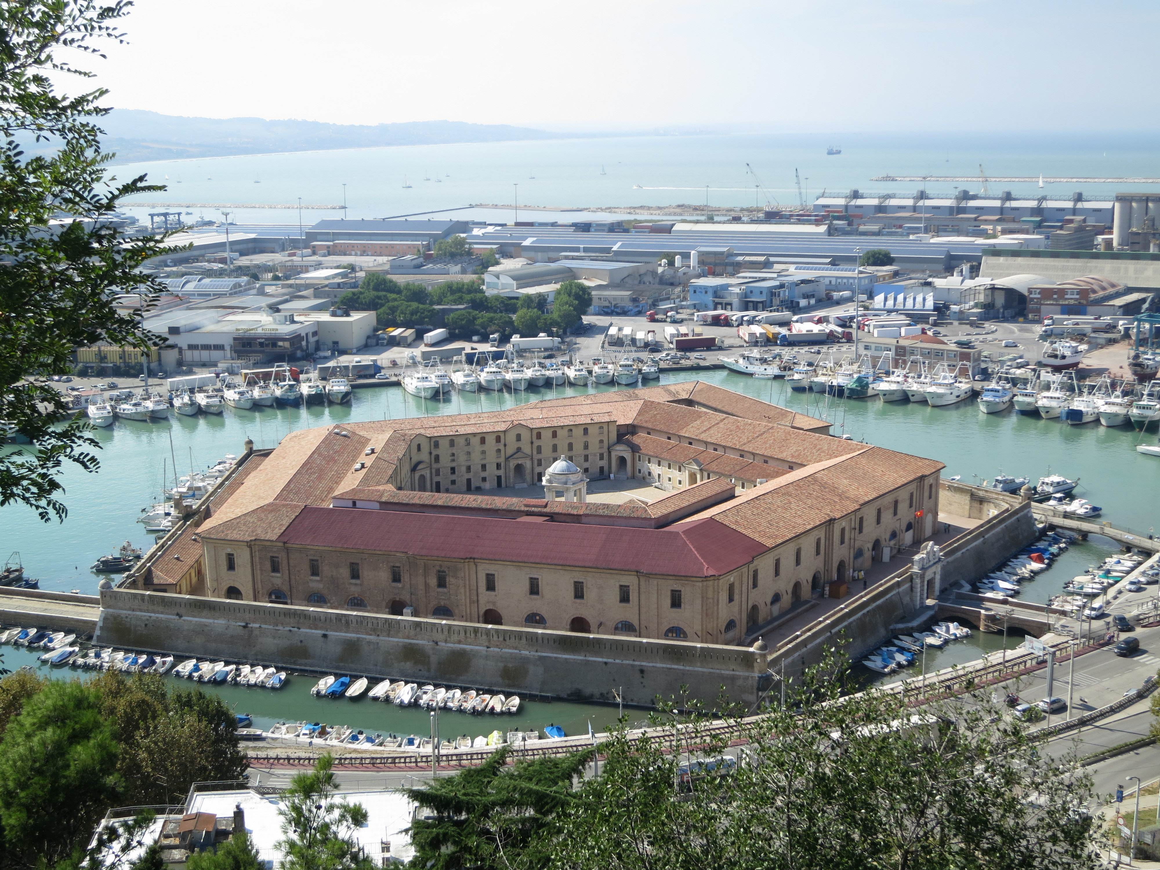 Mole Vanvitelliana This is a photo of a monument which is part of cultural heritage of Italy.